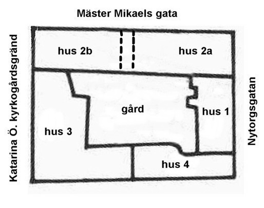 Fastigheten Sankta katarina större, plan